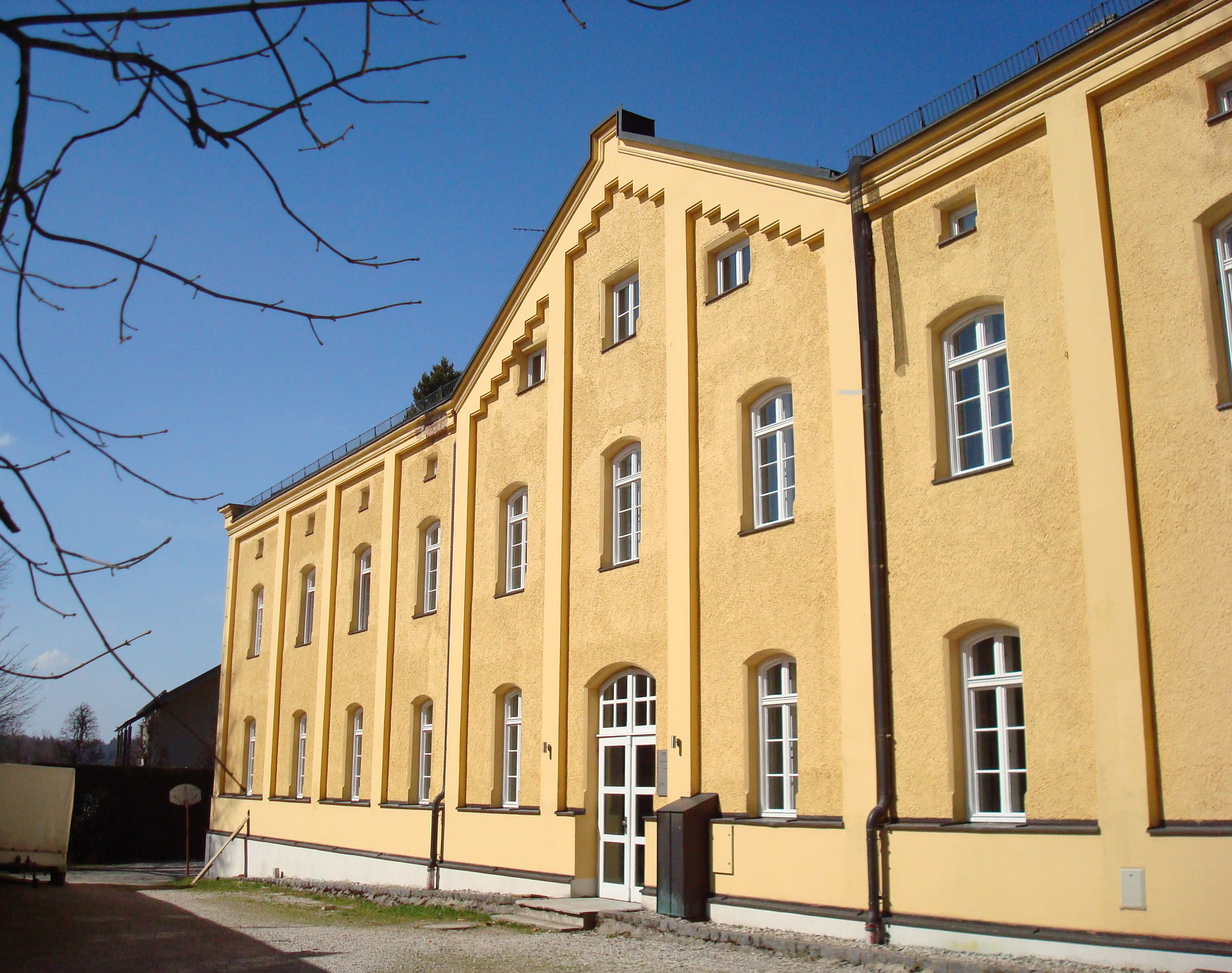 Berg am Starnberger See, Mühlgasse 7. Der ehemals zu Schloss Berg gehörige Marstall, ein zweieinhalbgeschossiger langer Trakt mit Lisenengliederungen und Treppengiebelfriesen an den Giebeln, wurde 1866 erbaut.